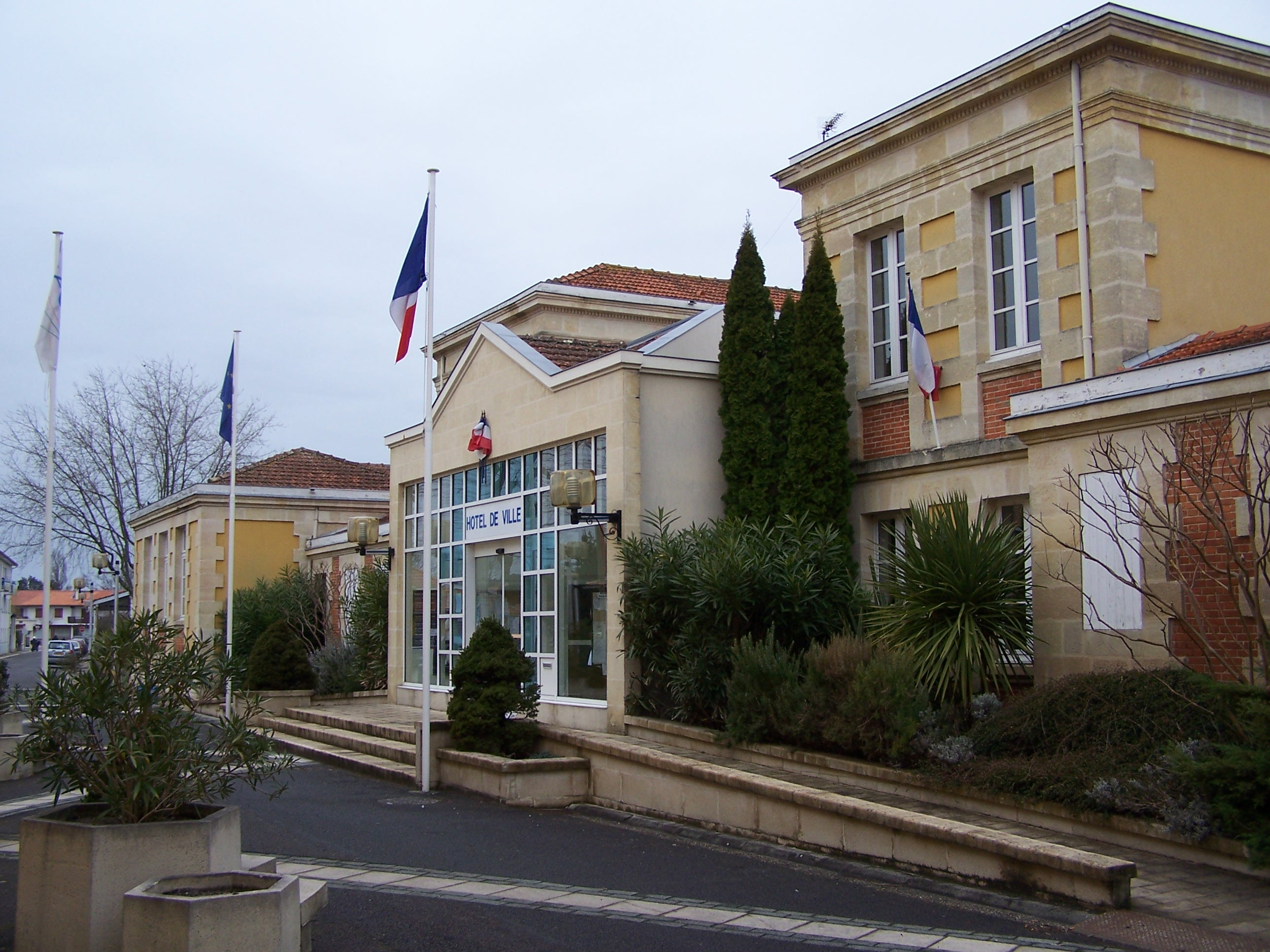 Mairie d'Arès, Gironde, France